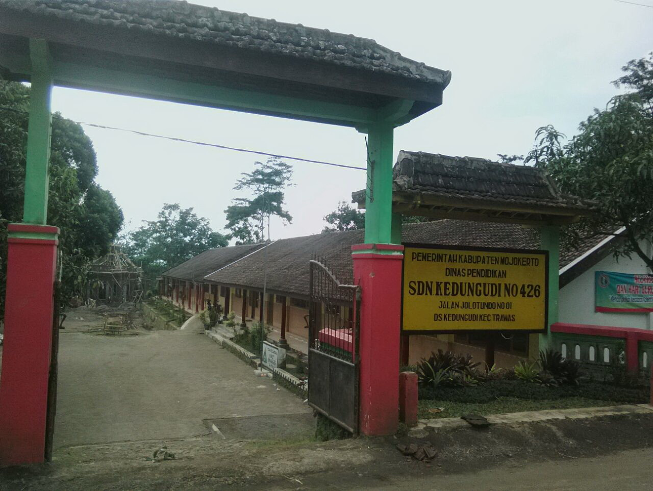 Bangunan Sekolah Dasar Negeri Kedungudi di jalan Jolotundo No.1 Kedungudi. Sekolah ini adalah sekolah satu-satunya di desa Kedungudi.